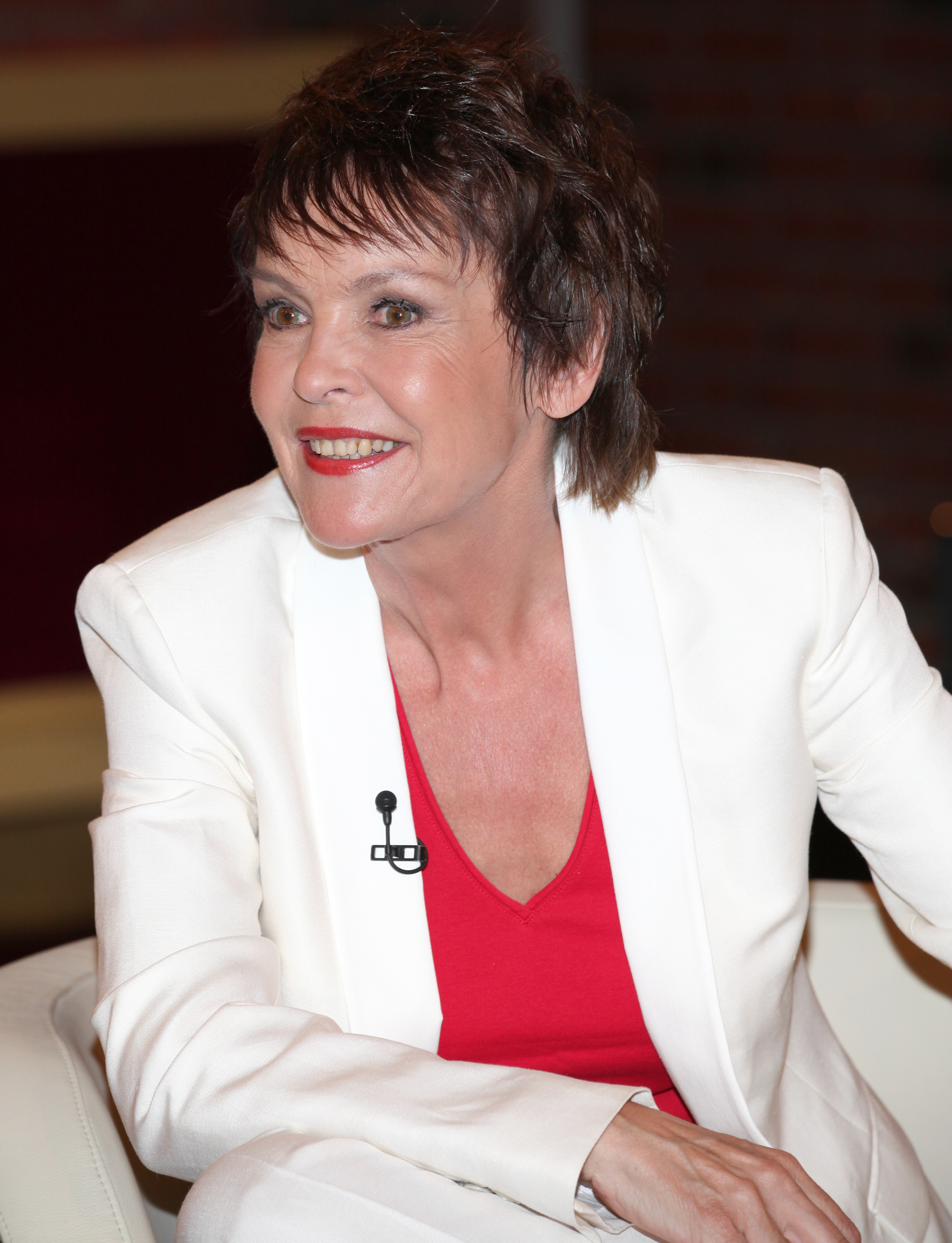 Katrin Sass (* 23. Oktober 1956 in Schwerin) ist eine deutsche Theater-, Film- und Fernsehschauspielerin.